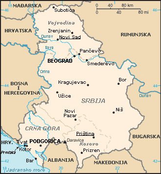 Ovu sam sliku napravio na temelju CIA-ine slike u javnom vlasniÅ¡tvu. --Zmaj 16:20, 1. lipanj 2007. (CEST)